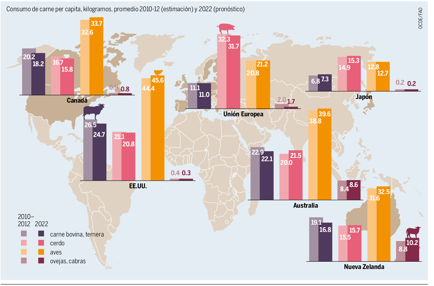 Consumo de carne per capita, kilogramos, promedio 2010-12 (estimación) y 2022 (pronóstico)